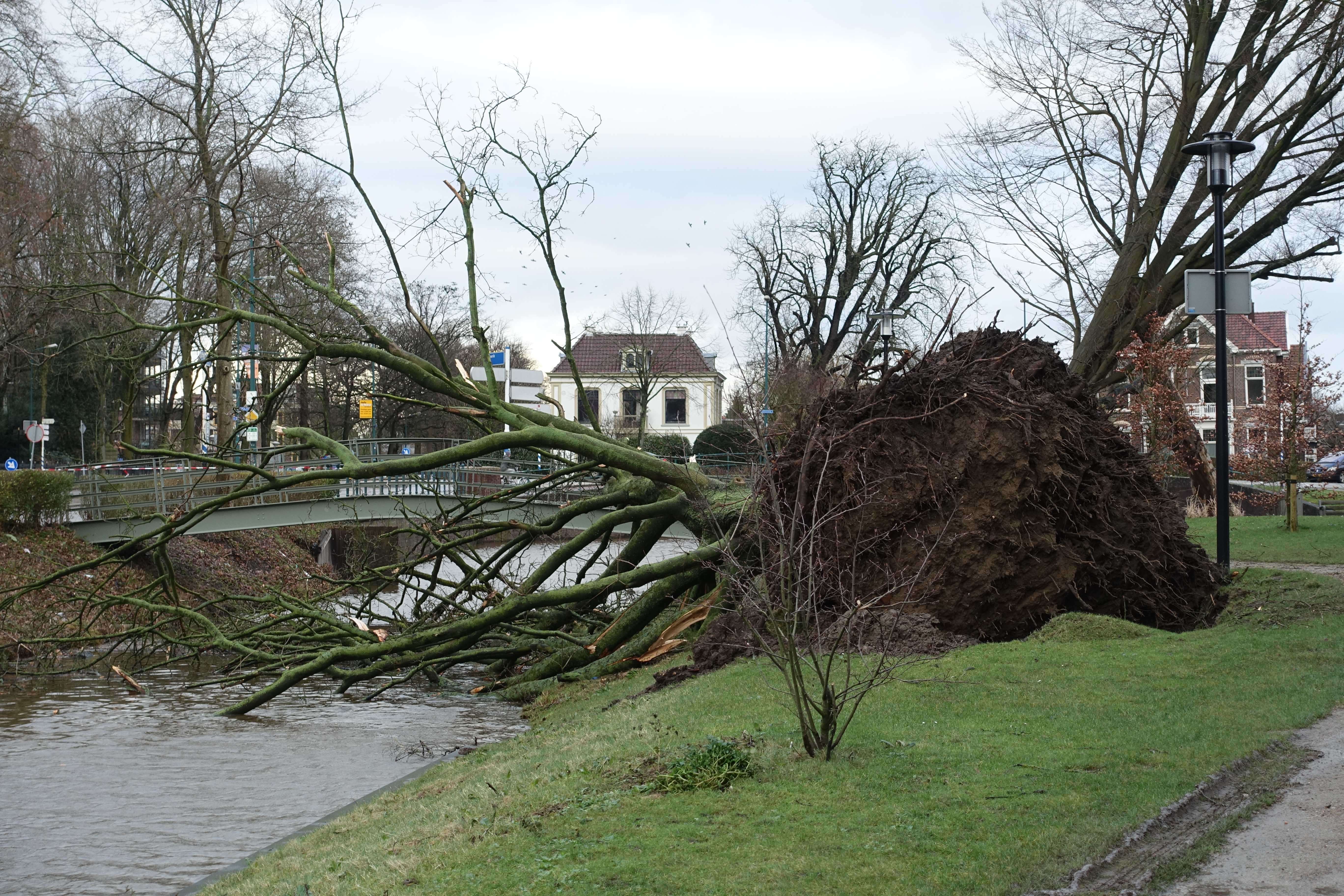 Stormschade in Woerden door storm van 18 januari 2018, Ontwortelde boom op het defensie-eiland